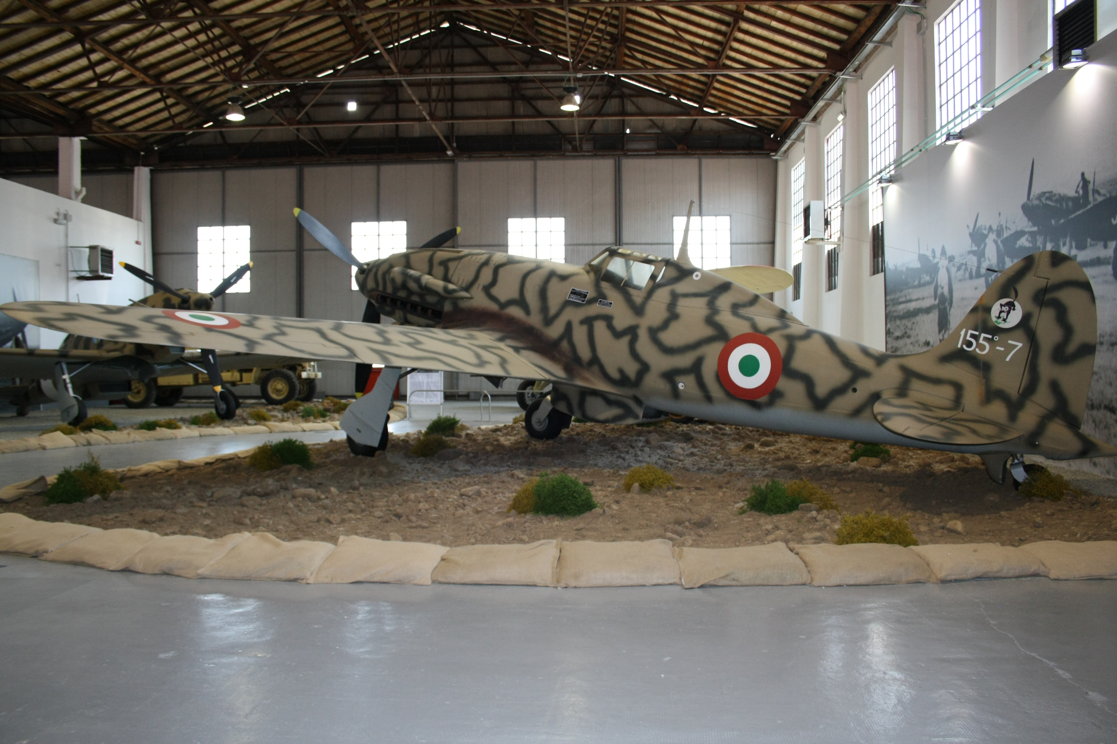 Macchi MC.205 conservato presso il museo del volo "Volandia".